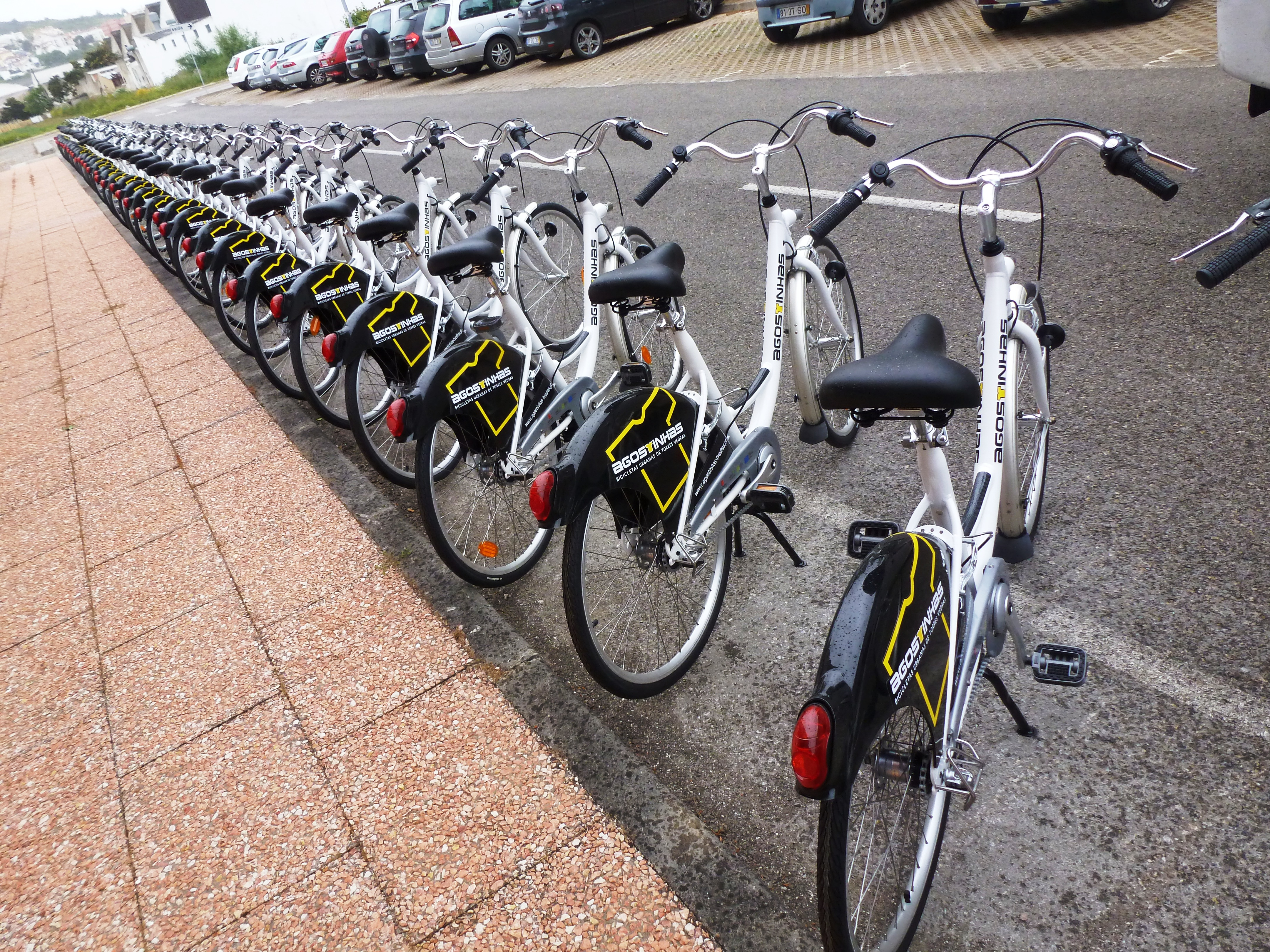 Bike Charing System in Torres Vedras, "Agostinhos"